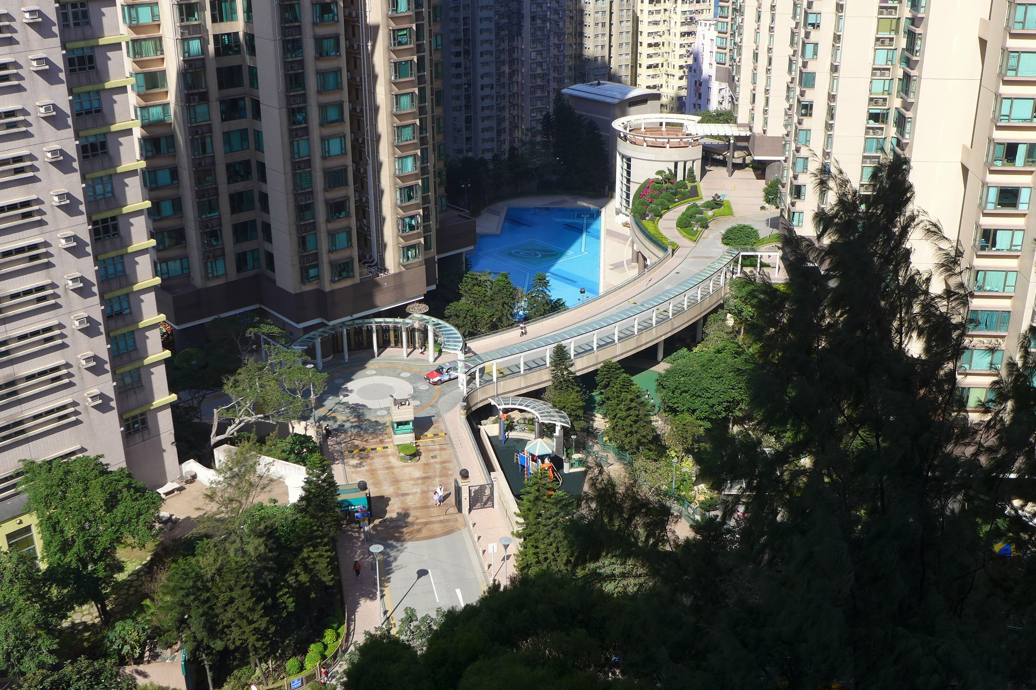 The Belchers Podium